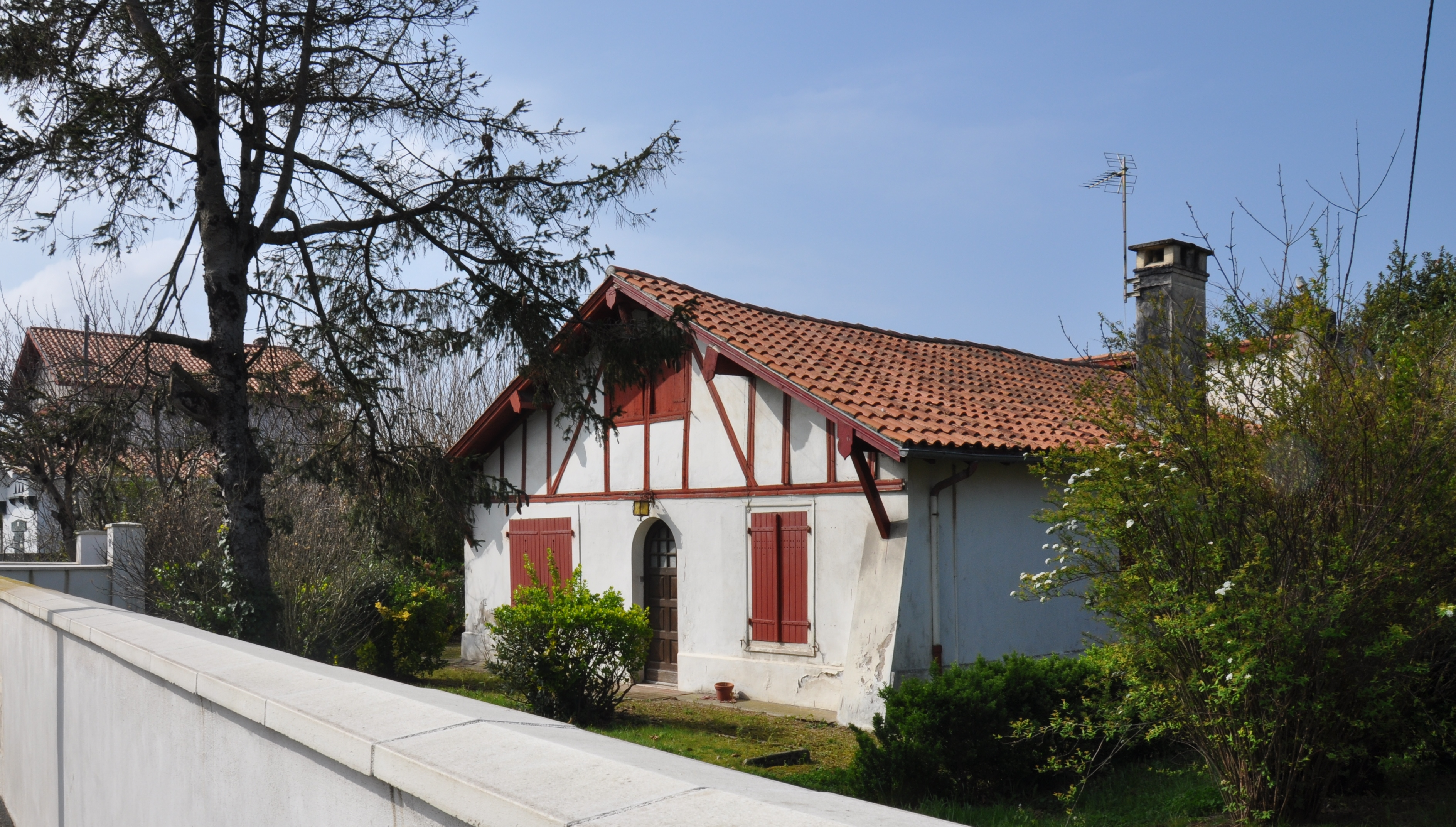 Ancienne ferme rural - rue chassin Anglet